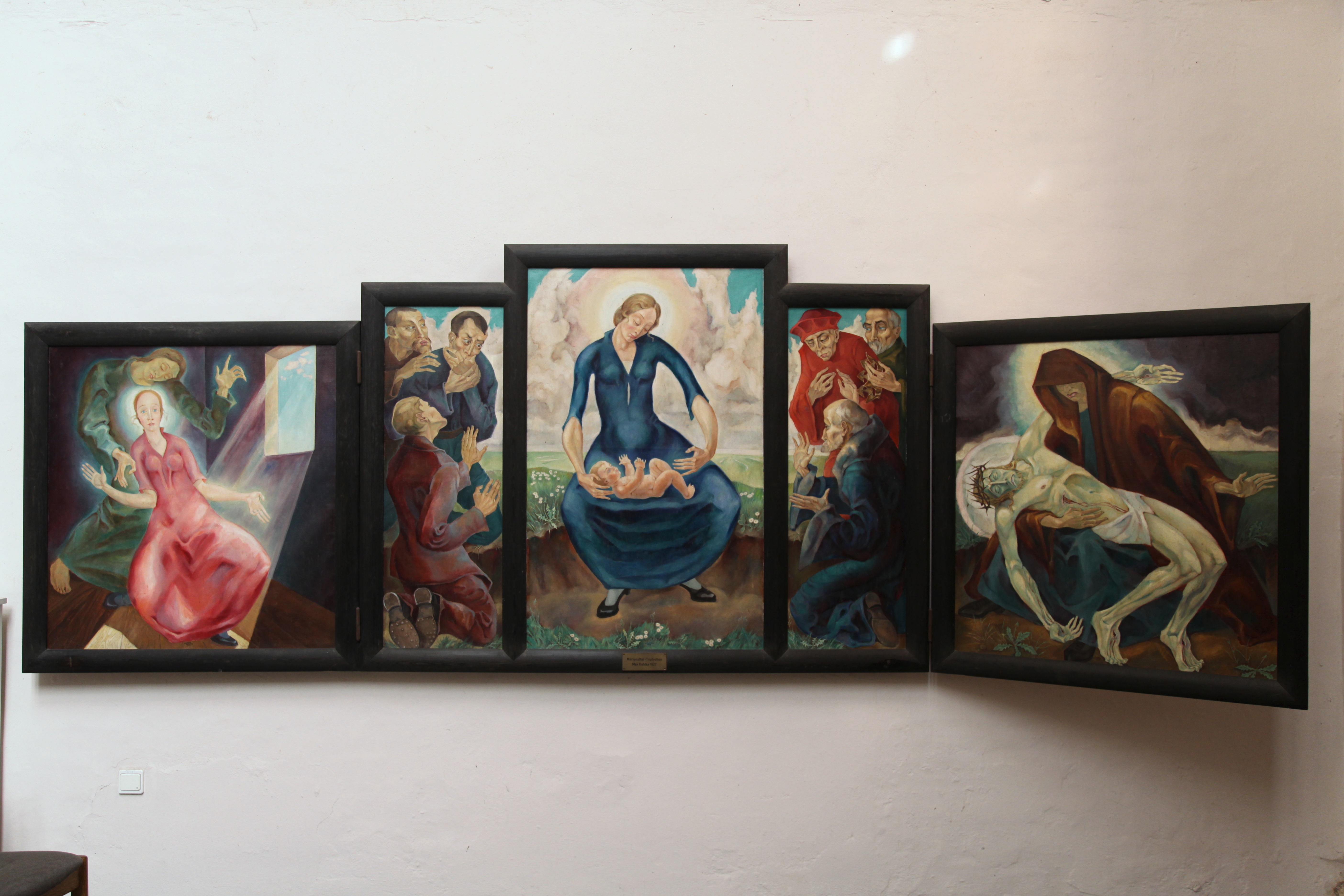 Marienaltar-Triptychon von Max Kalke, 1927, im Dom in Schleswig